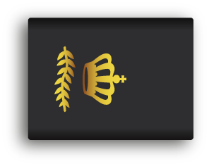 Rangen van de Nederlandse politie, epauletten (schuifpassanten) t.b.v. het huidige en het nieuwe (na 2014) uniform.